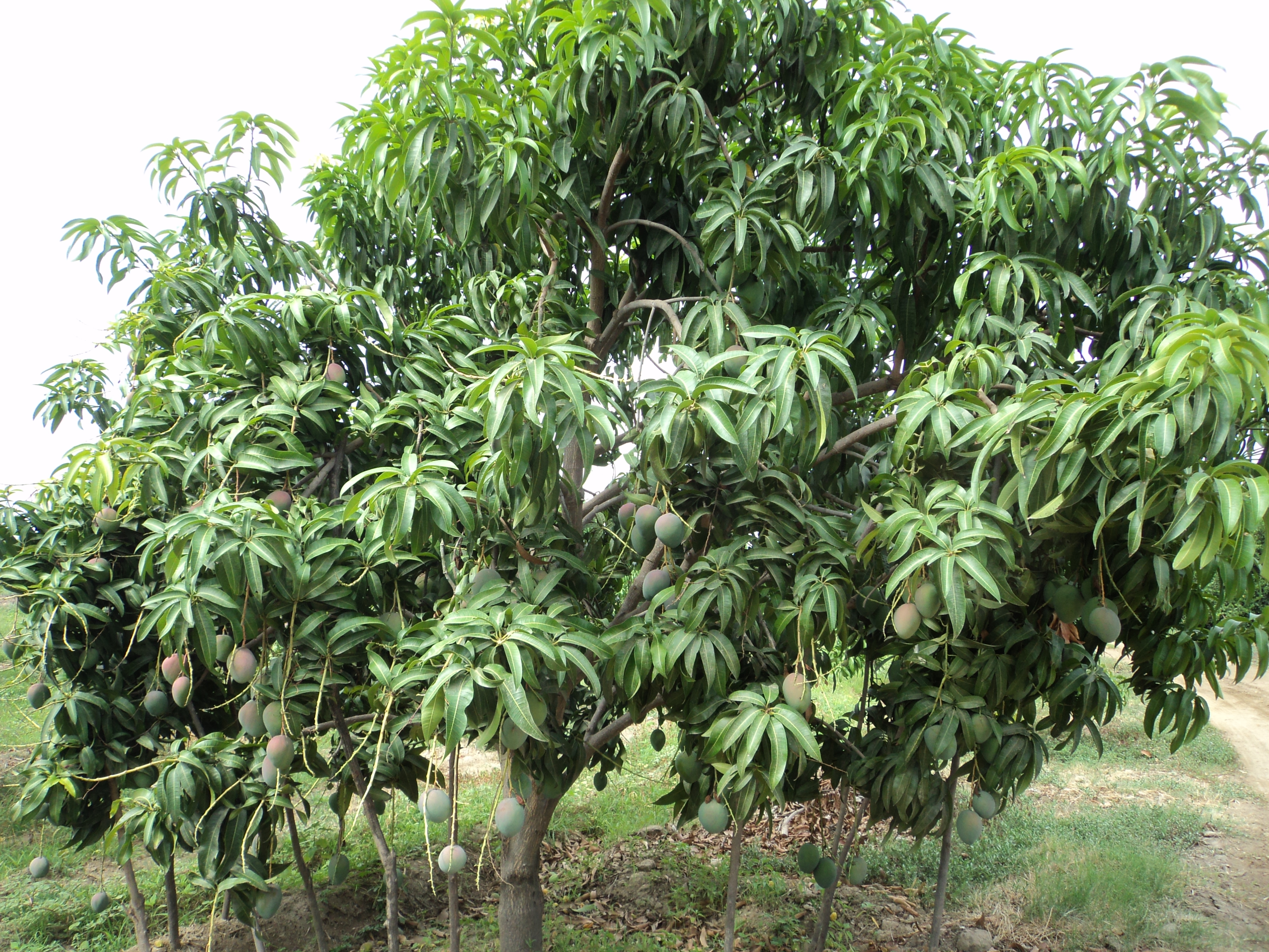 Planta de Mango